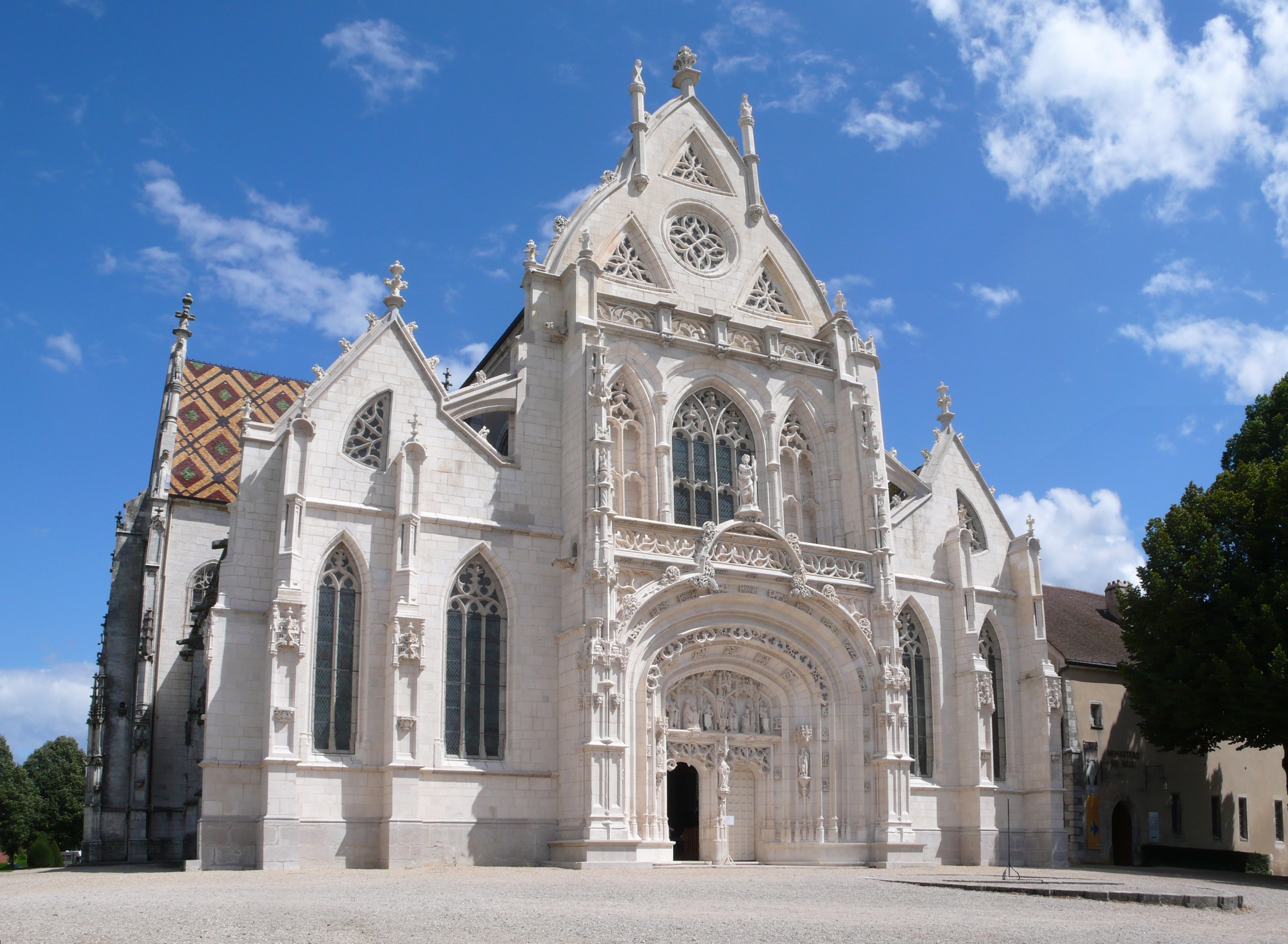 Église de Brou (Bourg-en-Bresse, Ain, France) (aus 2 Bildern)